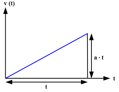 Zurückgelegte Strecke als Dreiecksfläche unter der Kurve momentane Geschwindigkeit gegen die Zeit bei Bewegung mit konstanter Beschleunigung